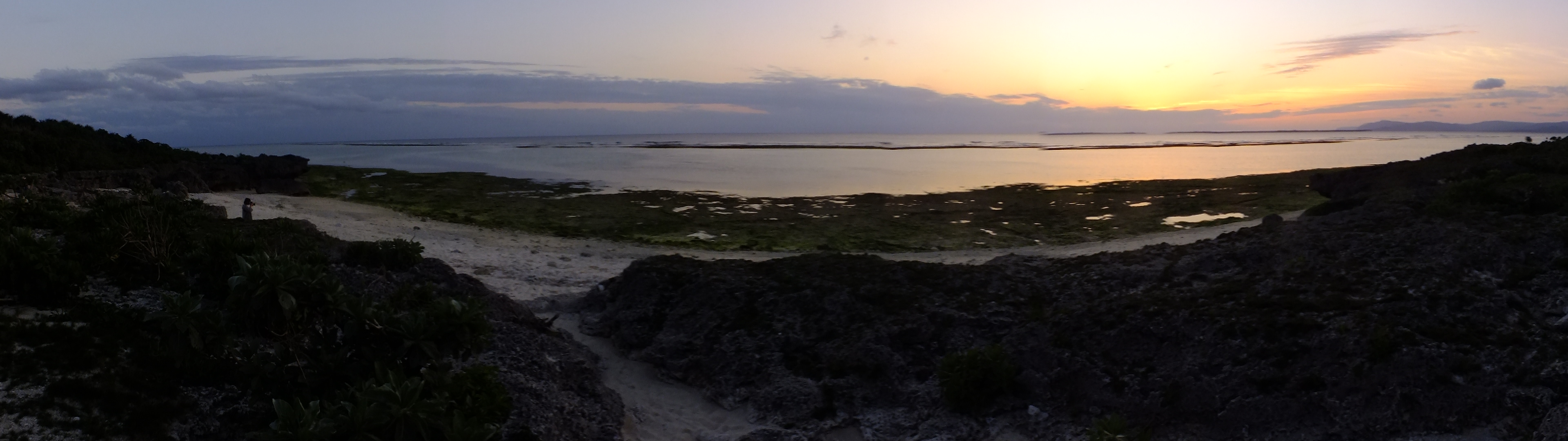 2016-02-28 Nakamoto Beach,Kuroshima(Taketomi, Okinawa) 沖縄県八重山諸島・黒島,仲本海岸